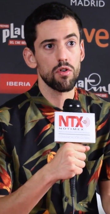 Luis Gerardo Méndez estrenará dos películas